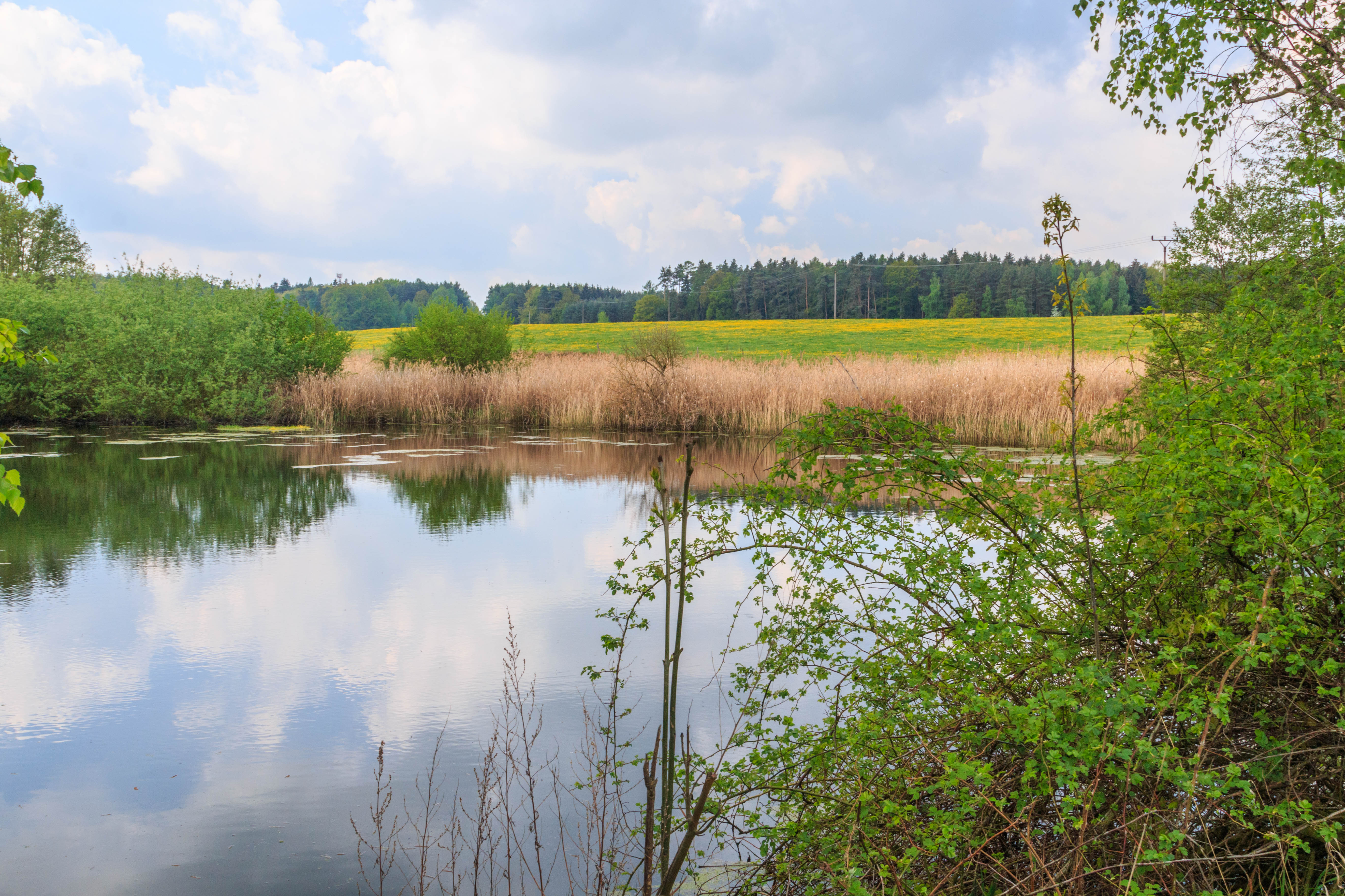 Rybník Kačák u Sovoluské Lhoty Project: Vodstvo.